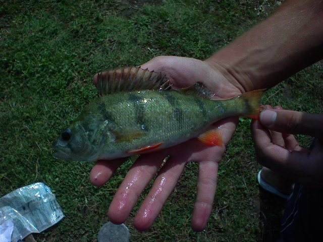 Голям костур уловен от рибар на язовир Одринци.